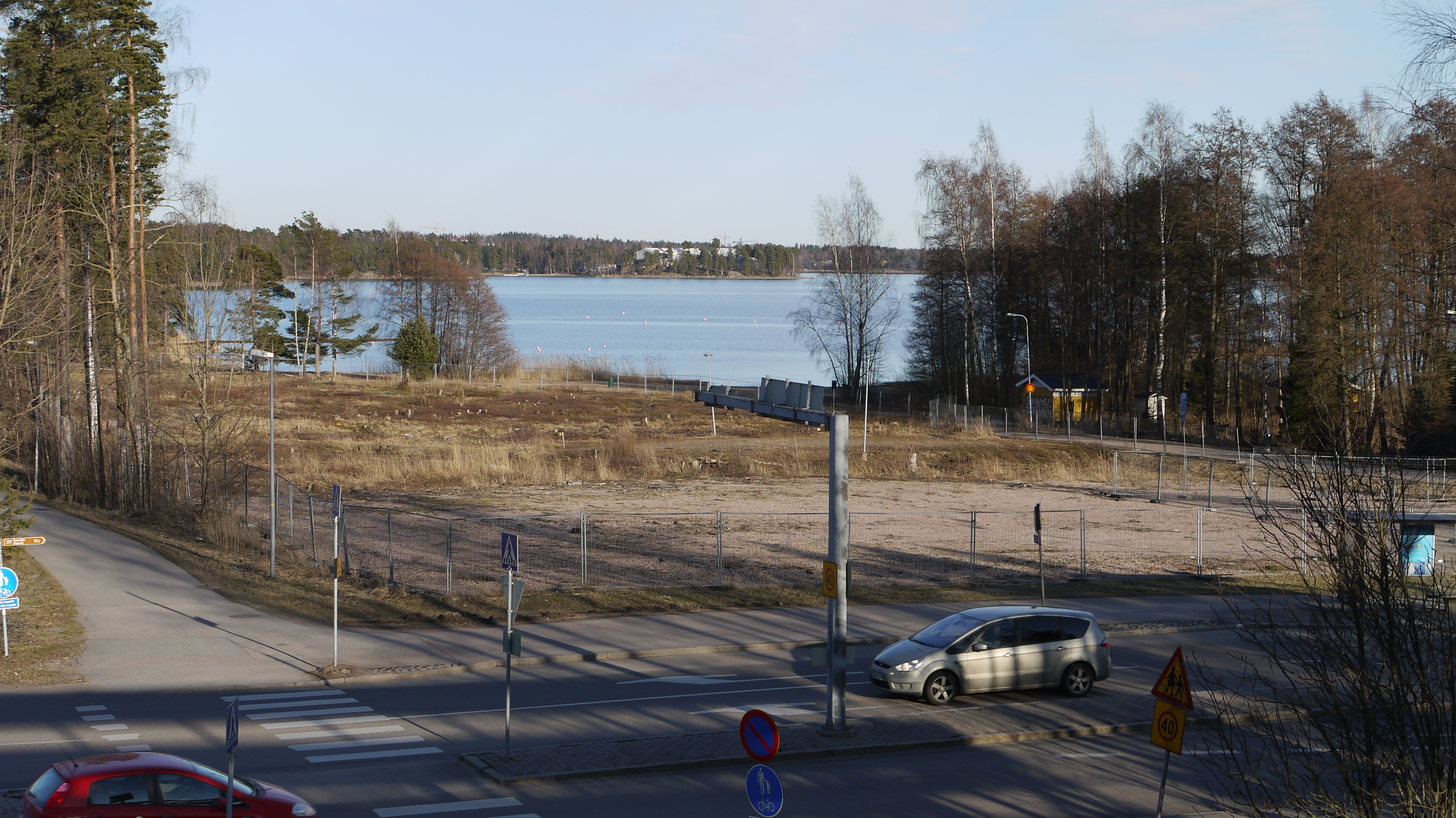 Espoon Westendinsolmussa sijaitseva maa-alue, jolle kiinteistö- ja sijoitusyhtiö Ultivista Oy on suunnitellut 18-kerroksista hotellia.